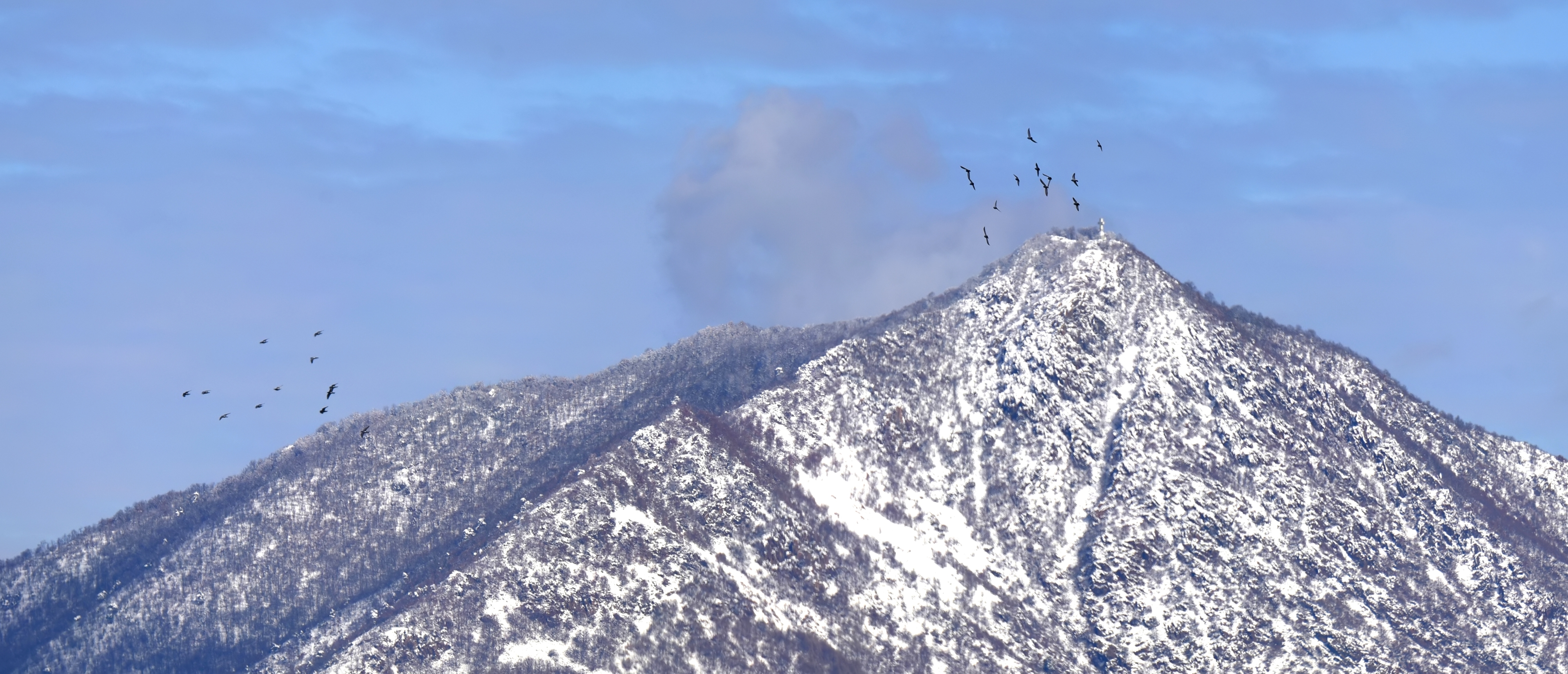 Monte Musiné e Laghi di Caselette (Q49964176)